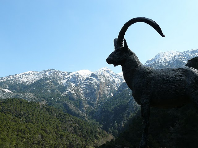 Maroma and Sierra Tejeda Natural Park This is a photography of a Special Area of Conservation in Spain with the ID: ES6170007. Natura2000 entry, EEA entry